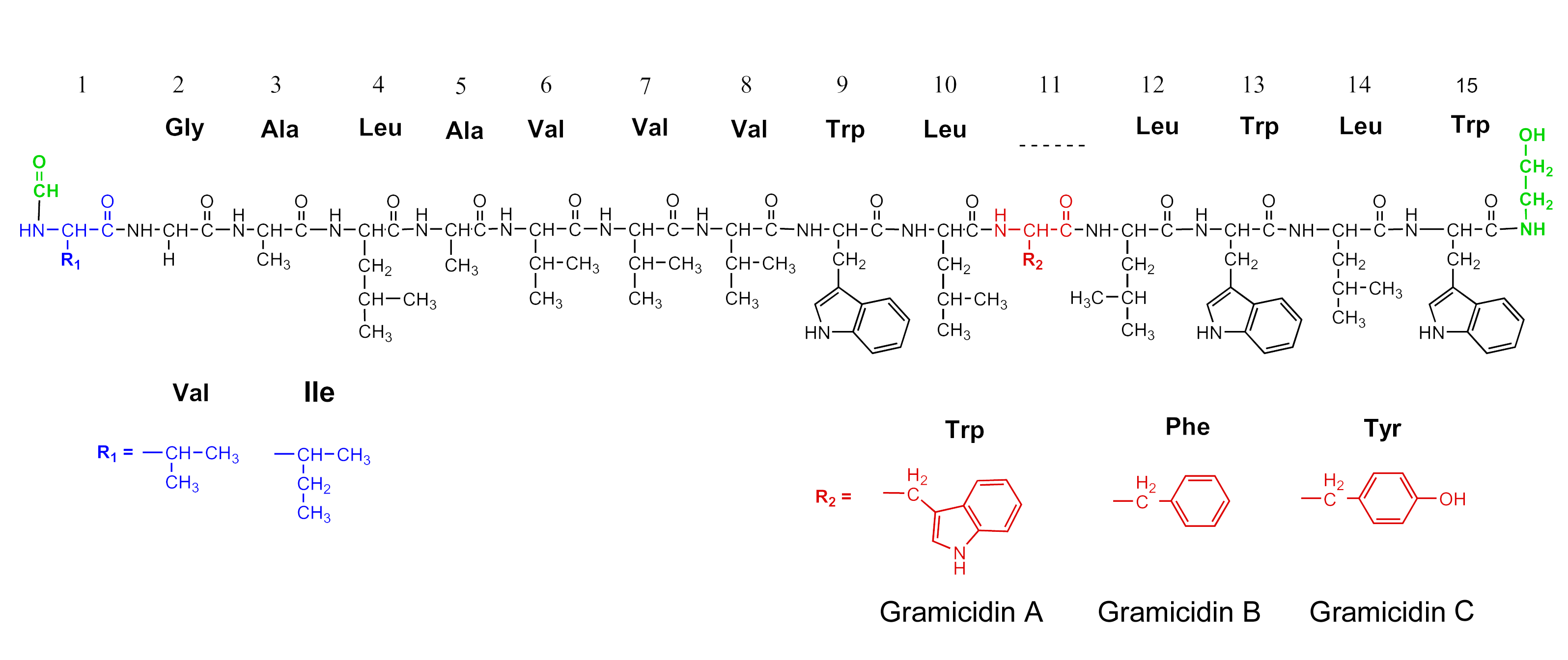 Struktura Gramicydyn A, B i C